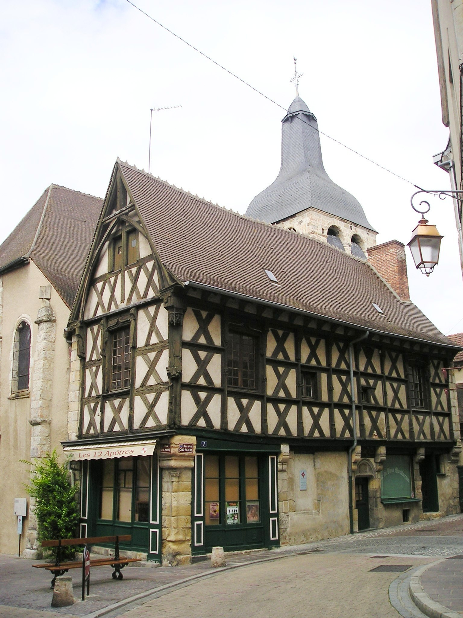 Montluçon,_Fachwerkbau_in_der_Altstadt